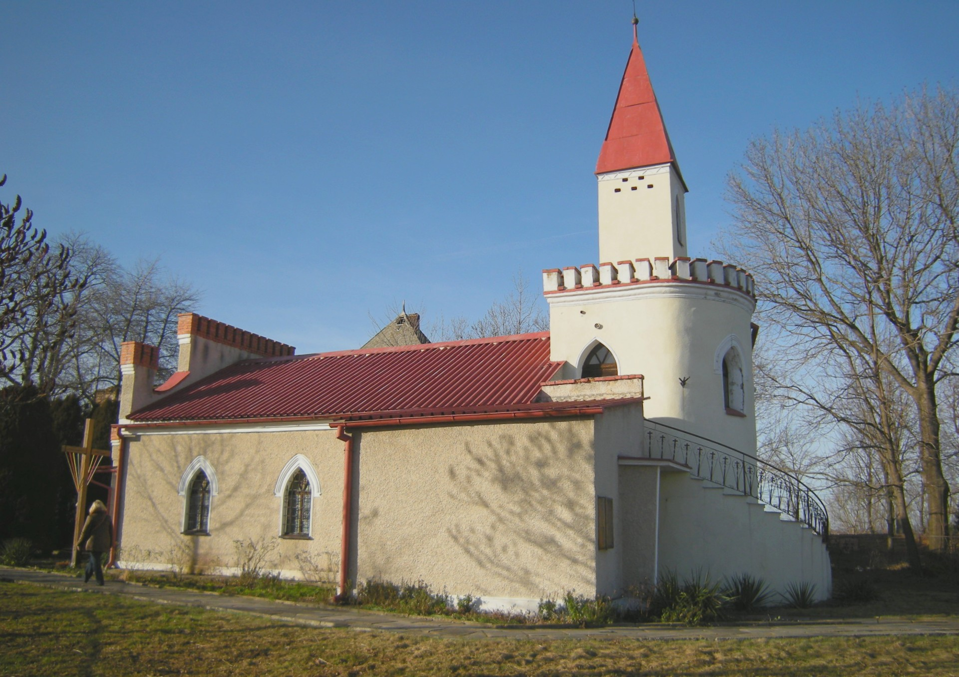 Kaplica w zespole dworskim Lisie Kąty, Paczków 06.1964.